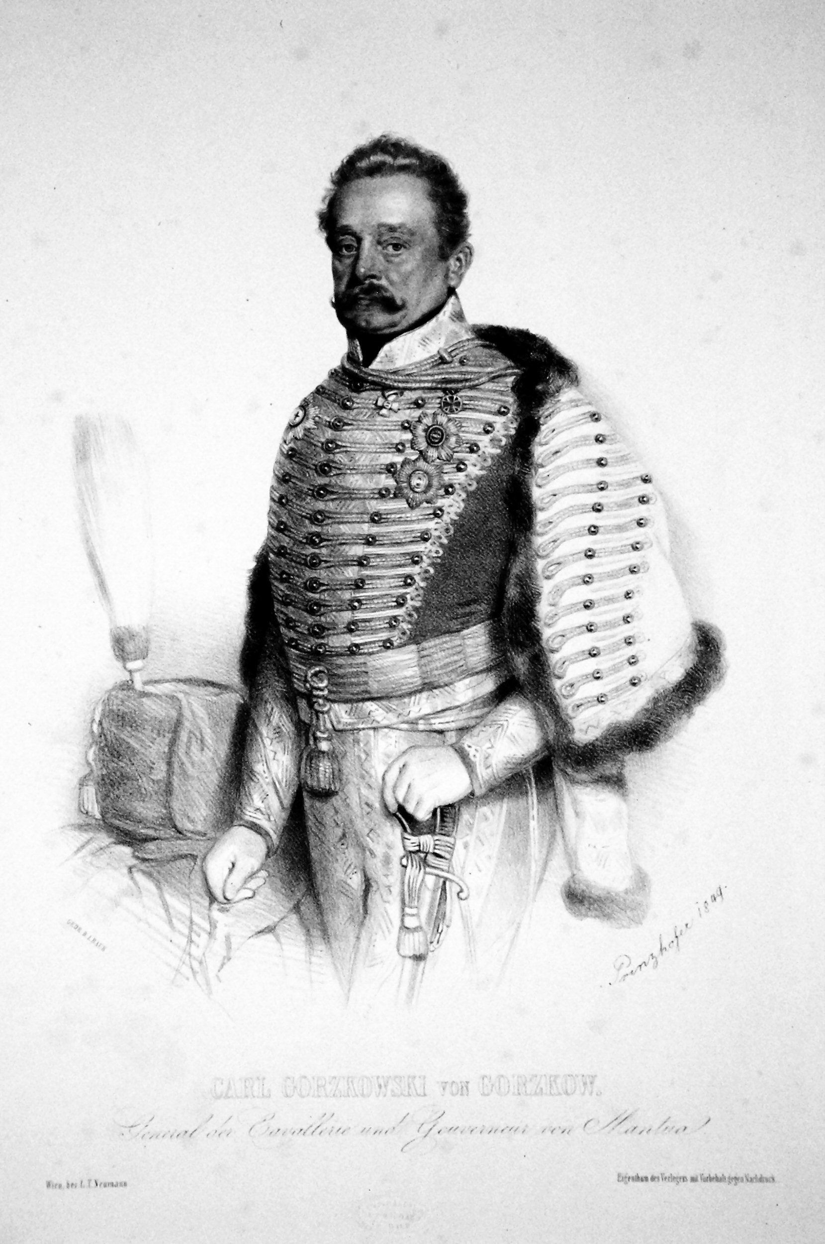 Karl Gorzkowski von Gorzkow (1778-1858), General der Kavallerie, Ritter des militärischen Maria-Theresia-Ordens. Lithographie von August Prinzhofer, 1849